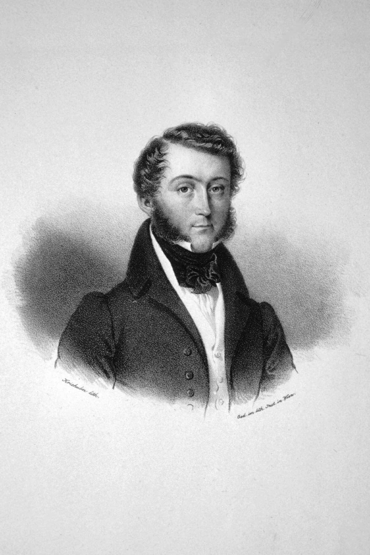 Karl Fürst zu Leiningen (1804-1856), Halbbruder der Königin Viktoria, königlich bayerischer Generalleutnant, Politiker. Lithographie von Josef Kriehuber, um 1835